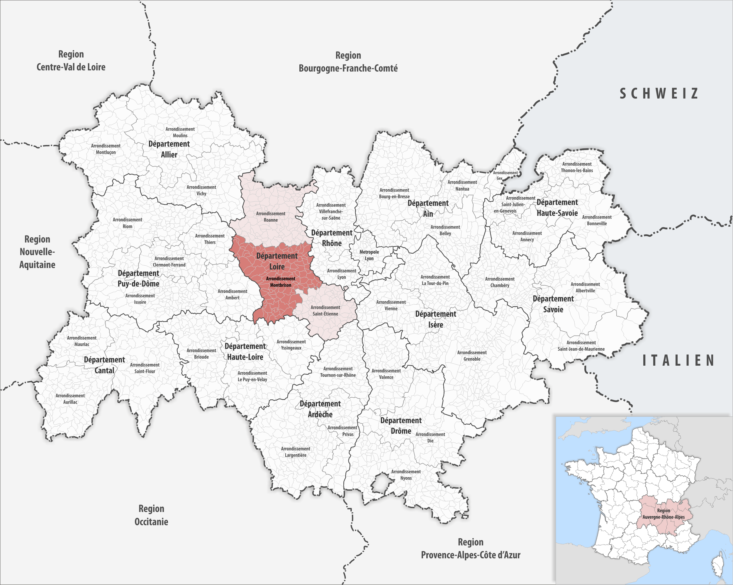 Lage des Arrondissements Montbrison